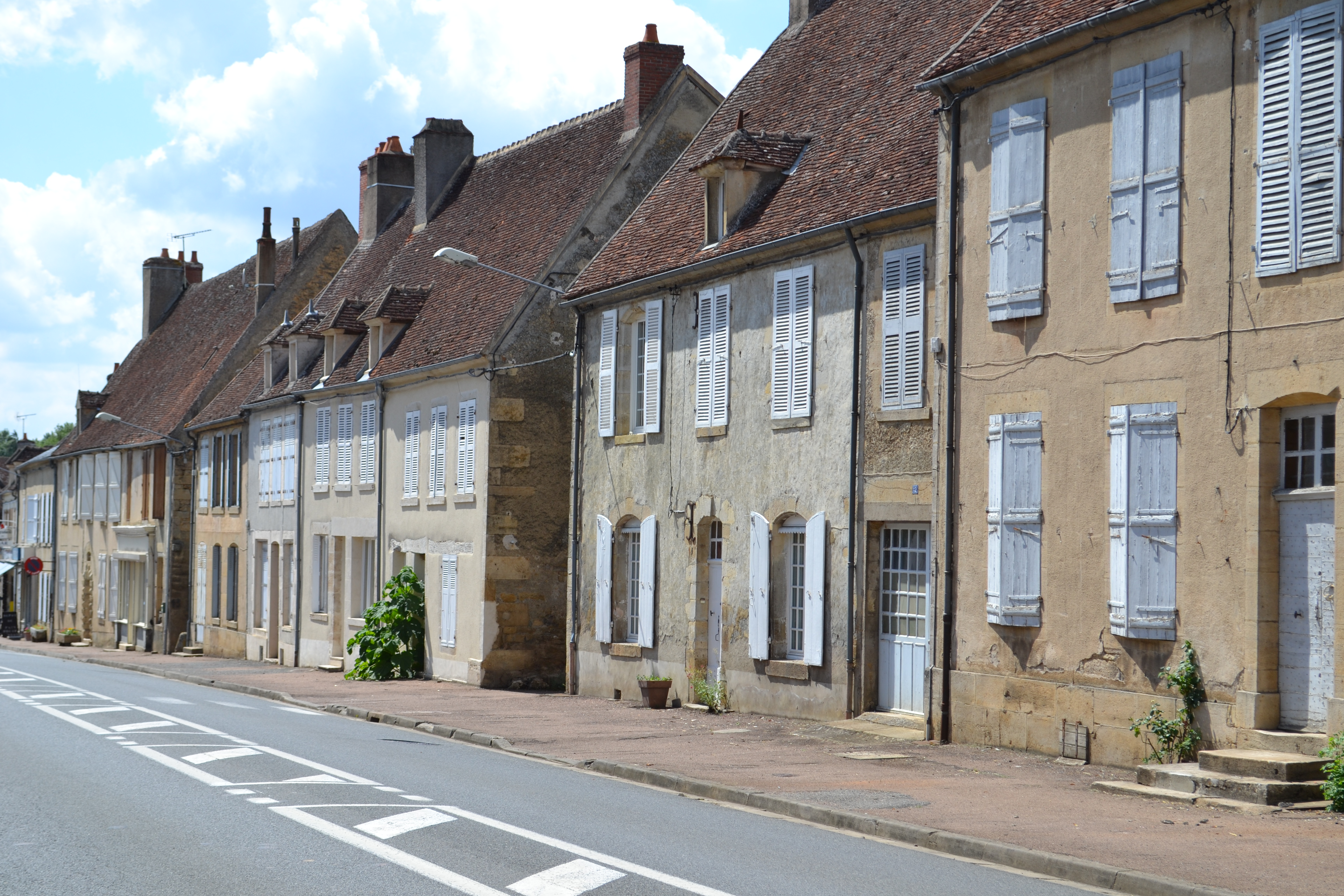 Rue principale de Champlemy (Nièvre).